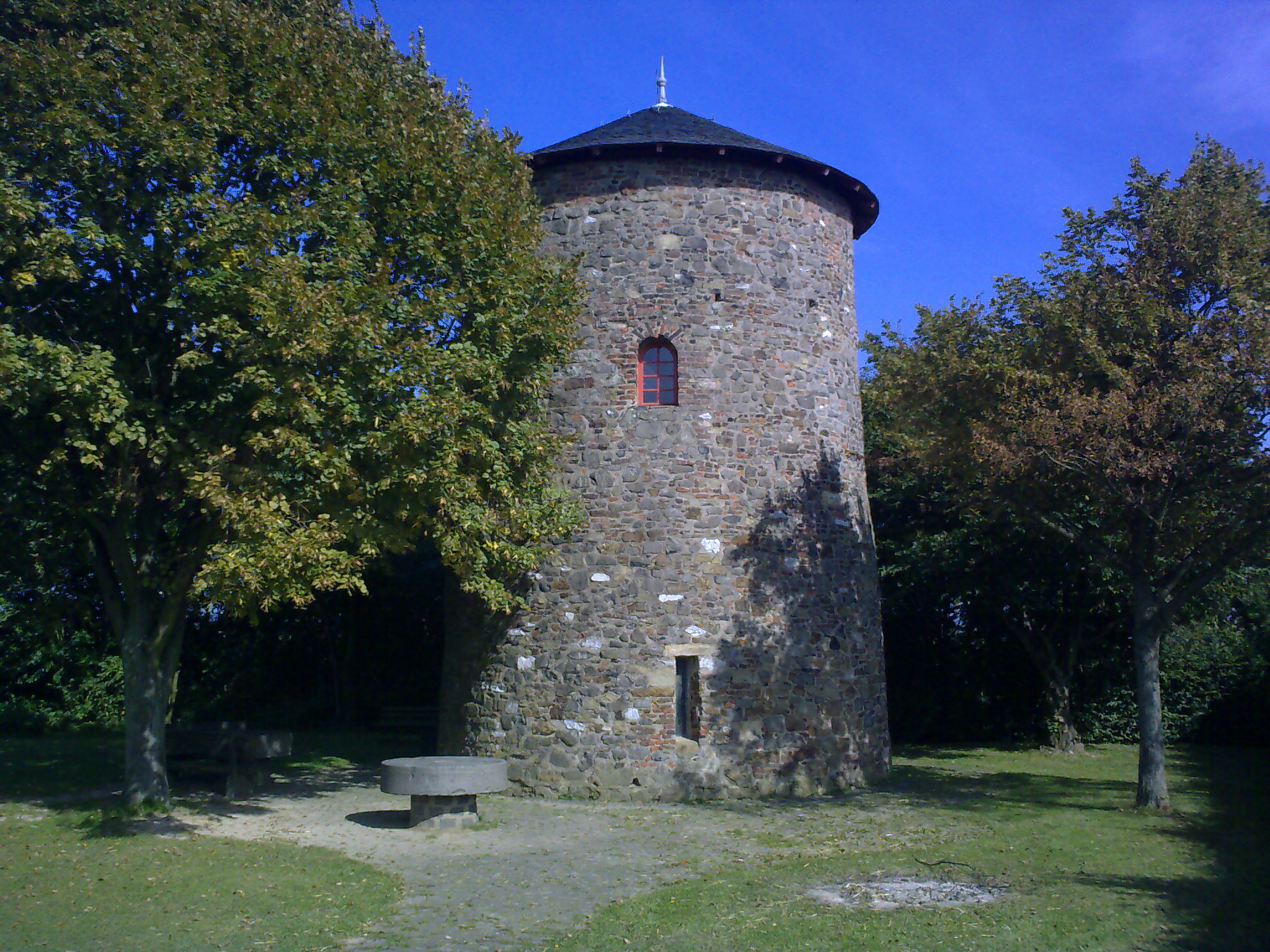 Fritzdorfer Windmühle, Windmühlenstraße, Wachtberg-Fritzdorf